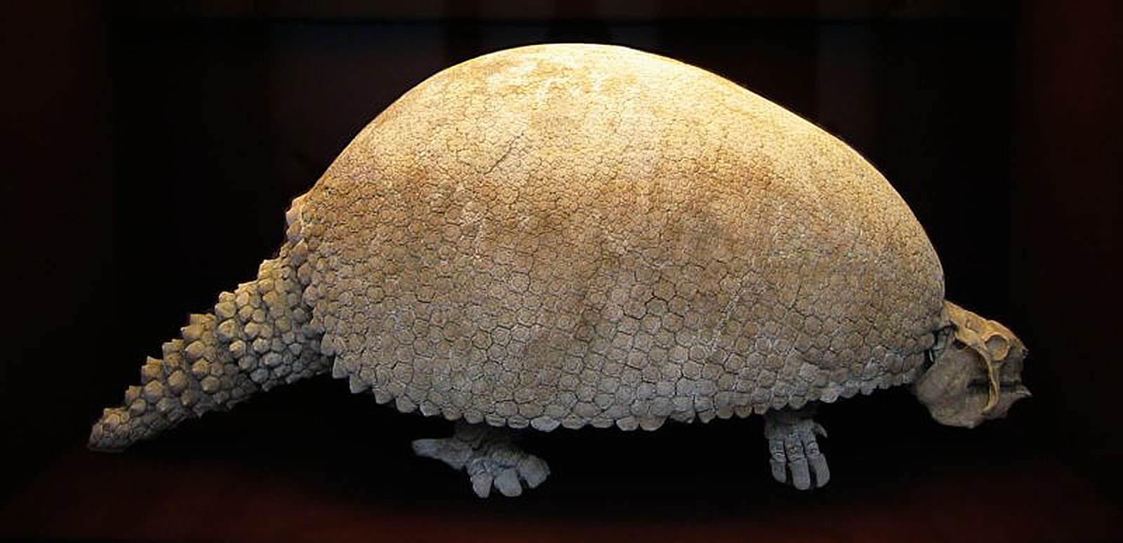 Glyptodon asper Burmeister (Riesengürteltier). Jung-Pleistozän, Rio Lujan, Argentinien. Naturhistorisches Museum Wien.